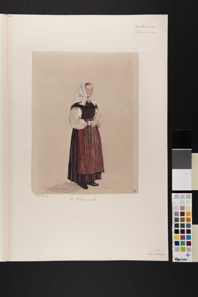 "Lima" . Kvinna i dräkt. Akvarell av P Södermark 1850. Depicted place: Lima socken (Q10561942)